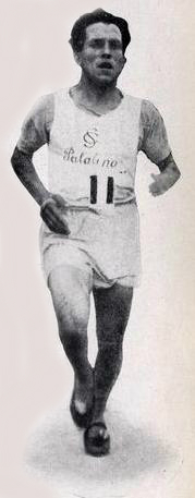 Il podista Carlo Speroni